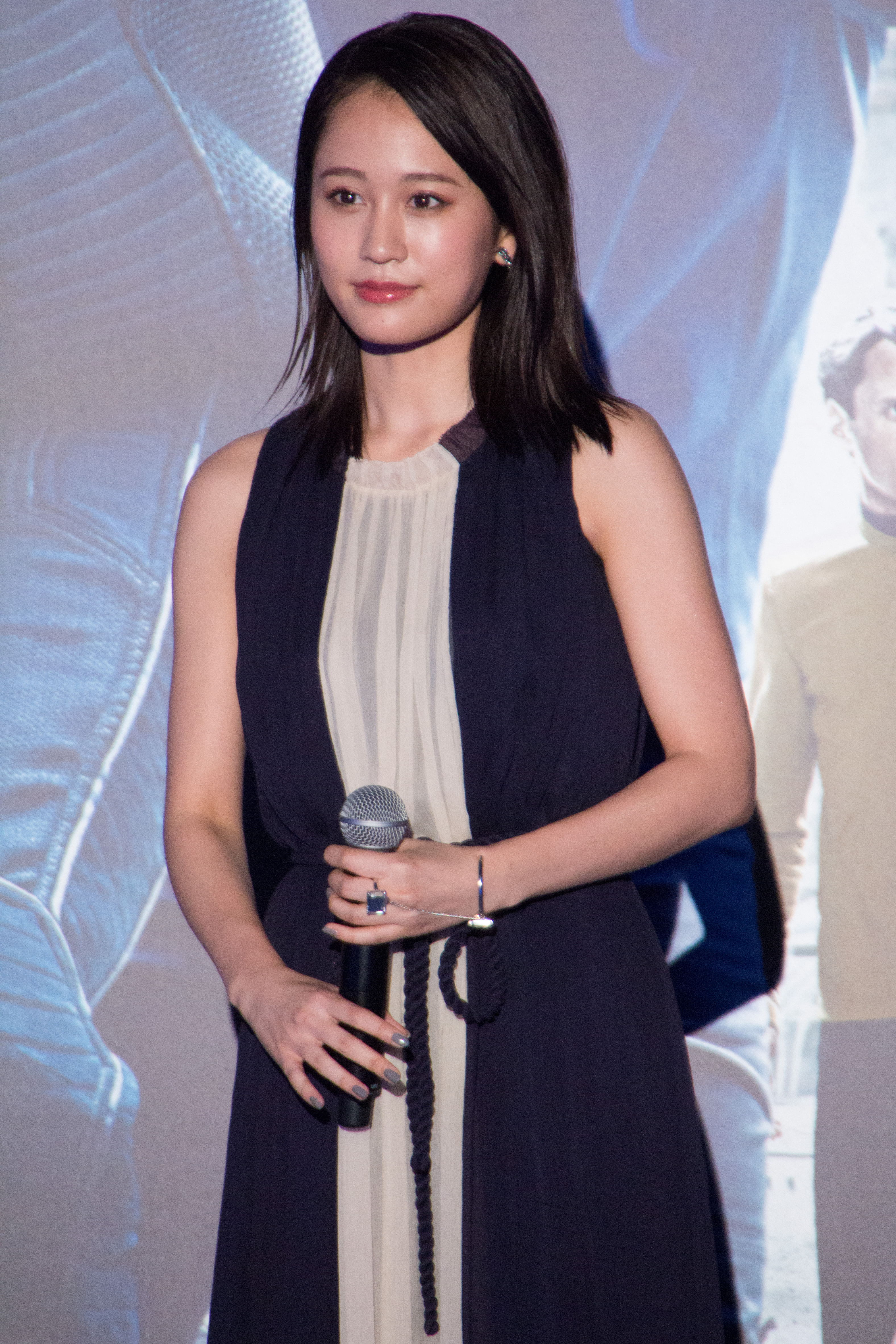 スター・トレック BEYOND ジャパン・プレミア レッドカーペット 前田敦子